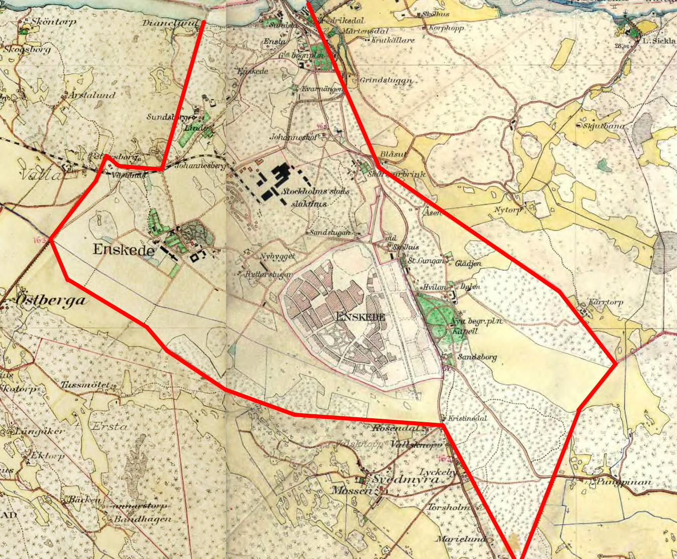 Karta över Enskede ägor på häradskartan från 1901-1906, lägg märke till att trädgårdsstaden Enskede (idag "Gamla Enskede") redan är inlagd i kartan, liksom Stockholms stads slakthus.